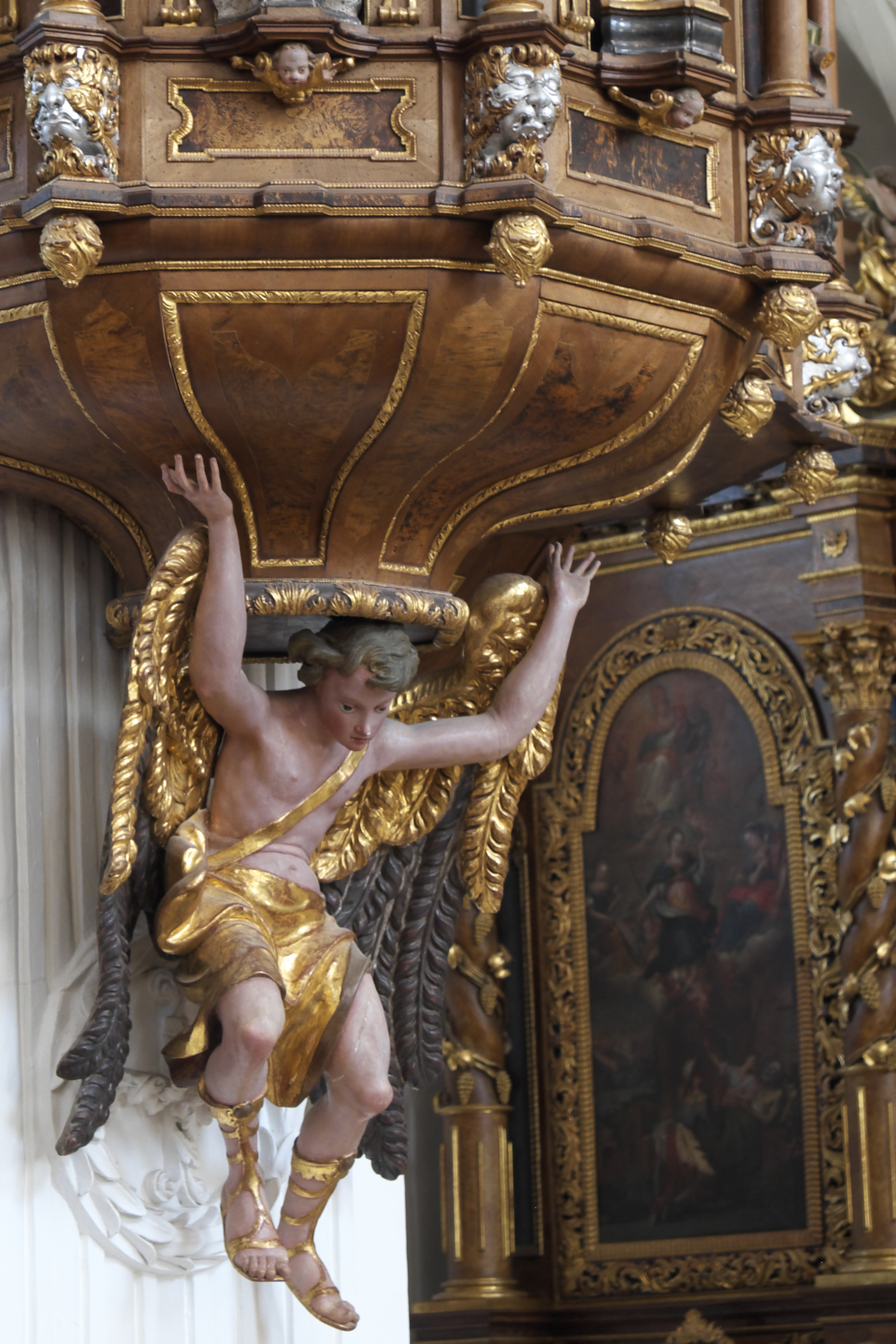 Ehemalige Prämonstratenserstiftskirche, Münster St. Peter und Paul, in Obermarchtal im Alb-Donau-Kreis (Baden-Württemberg/Deutschland), Kanzel von 1711/19, mit den Aposteln Petrus und Paulus und den vier Evangelisten, auf dem Schalldeckel Norbert von Xanten, zu seinen Füßen Tanchelm, unter dem Kanzelkorb ein Engel